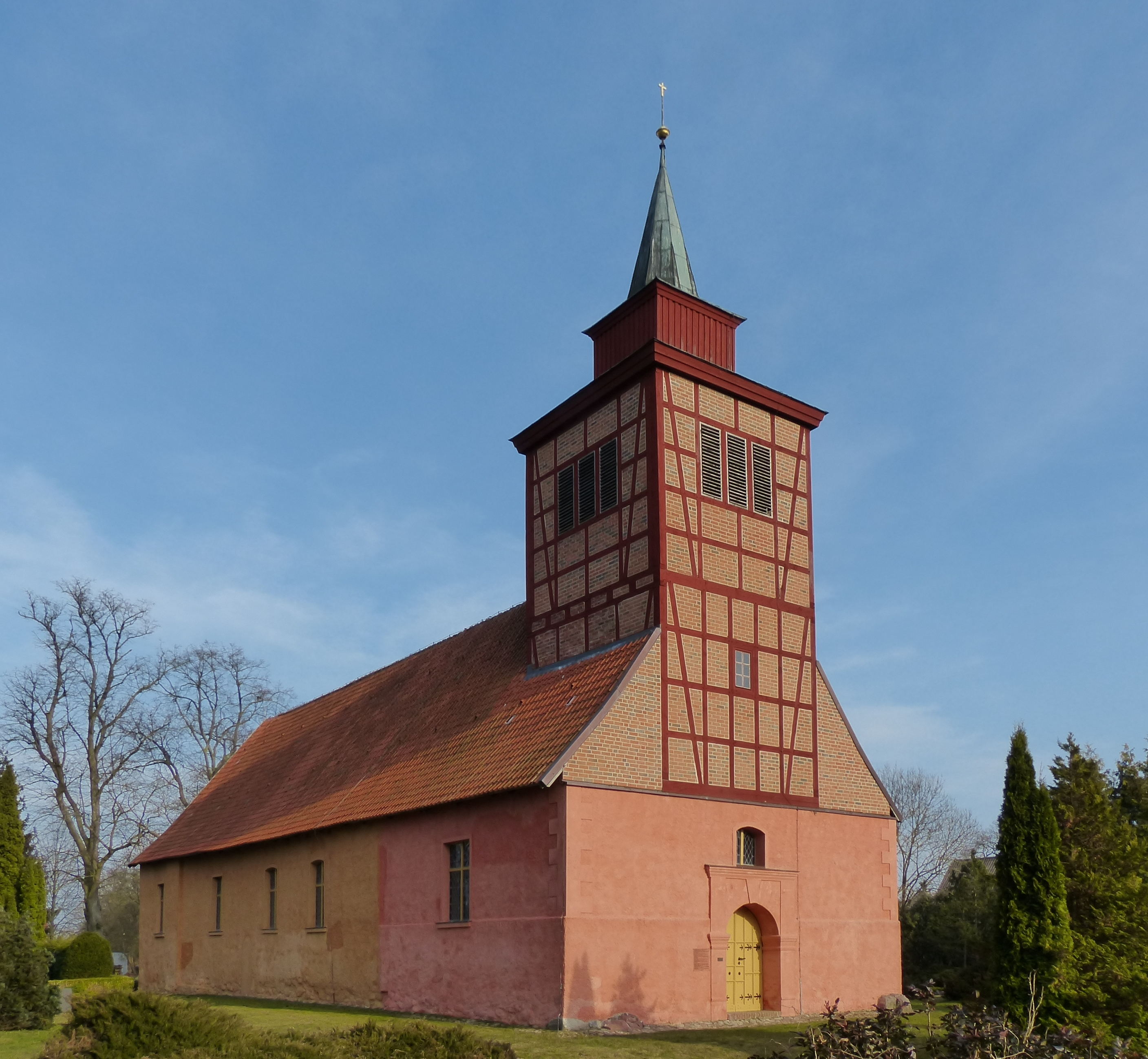 Kirche Kagendorf, Ansicht von Nordwesten